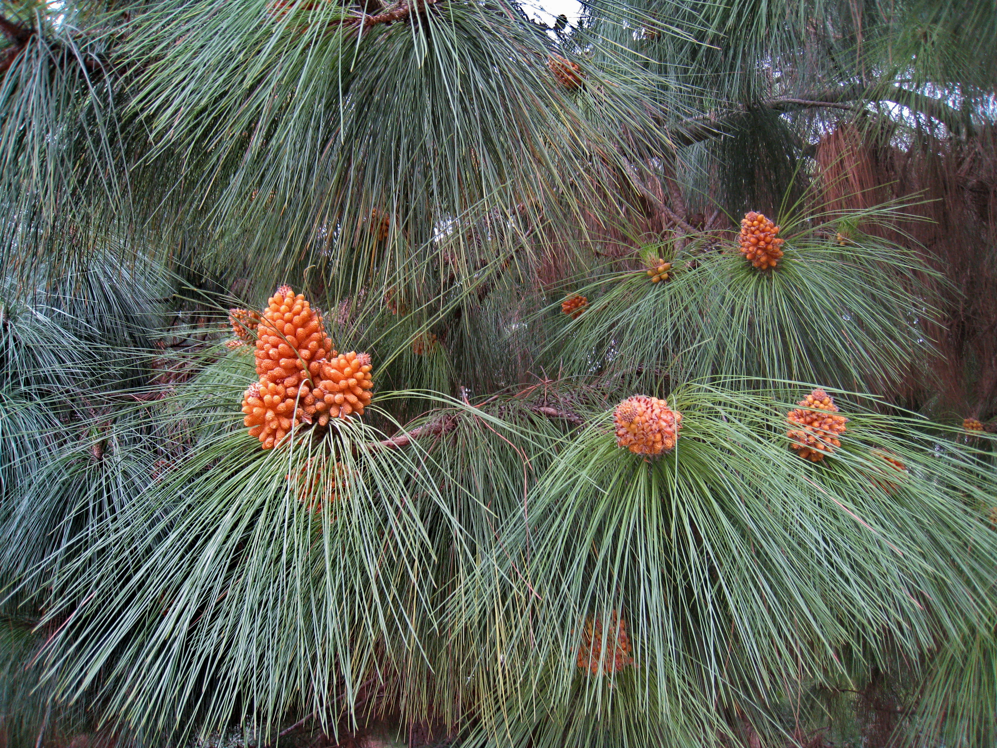 Pi Canari en fase de floració. Jardí Botànic de Barcelona